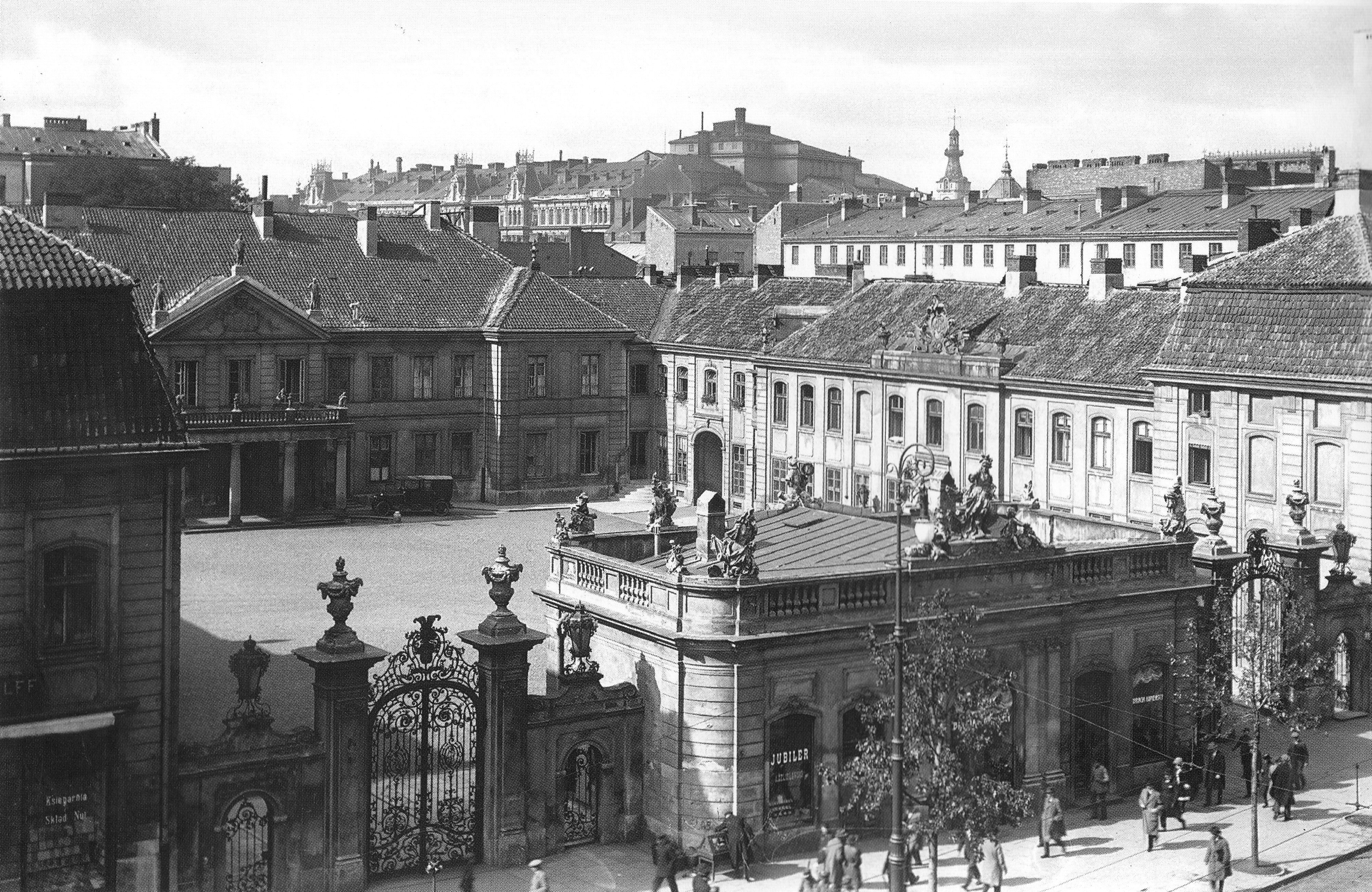 Pałac Potockich w Warszawie